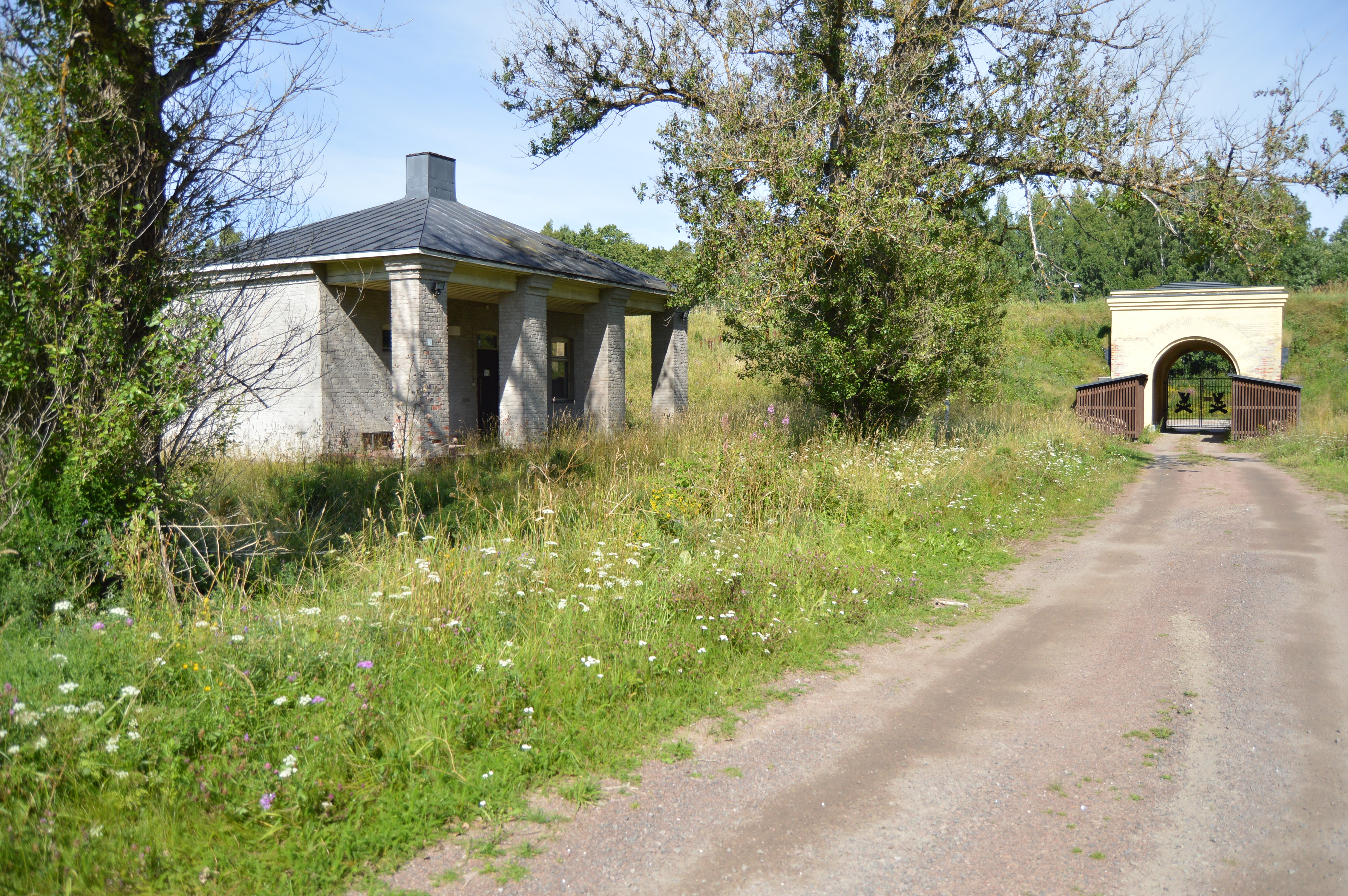 Kyminlinnan koillisportti ja sen vartiorakennus